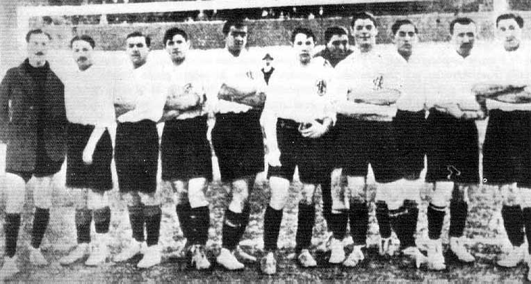 Racing de Irún campeón FECF 1913